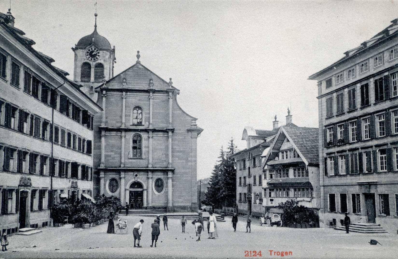 Dorfplatz von Trogen, Blick Richtung Kirche, mit dem Zellwegerschen Doppelpalast, der Kirche, dem Wohnhaus Nr. 4, der Krone und dem Rathaus